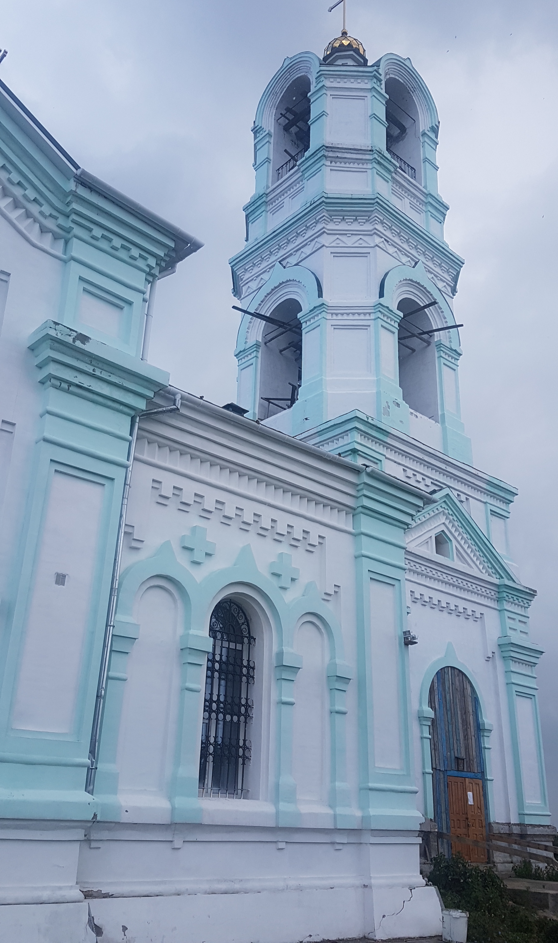 Церковь Живоначальной Троицы, село Польцо Нижегородской области